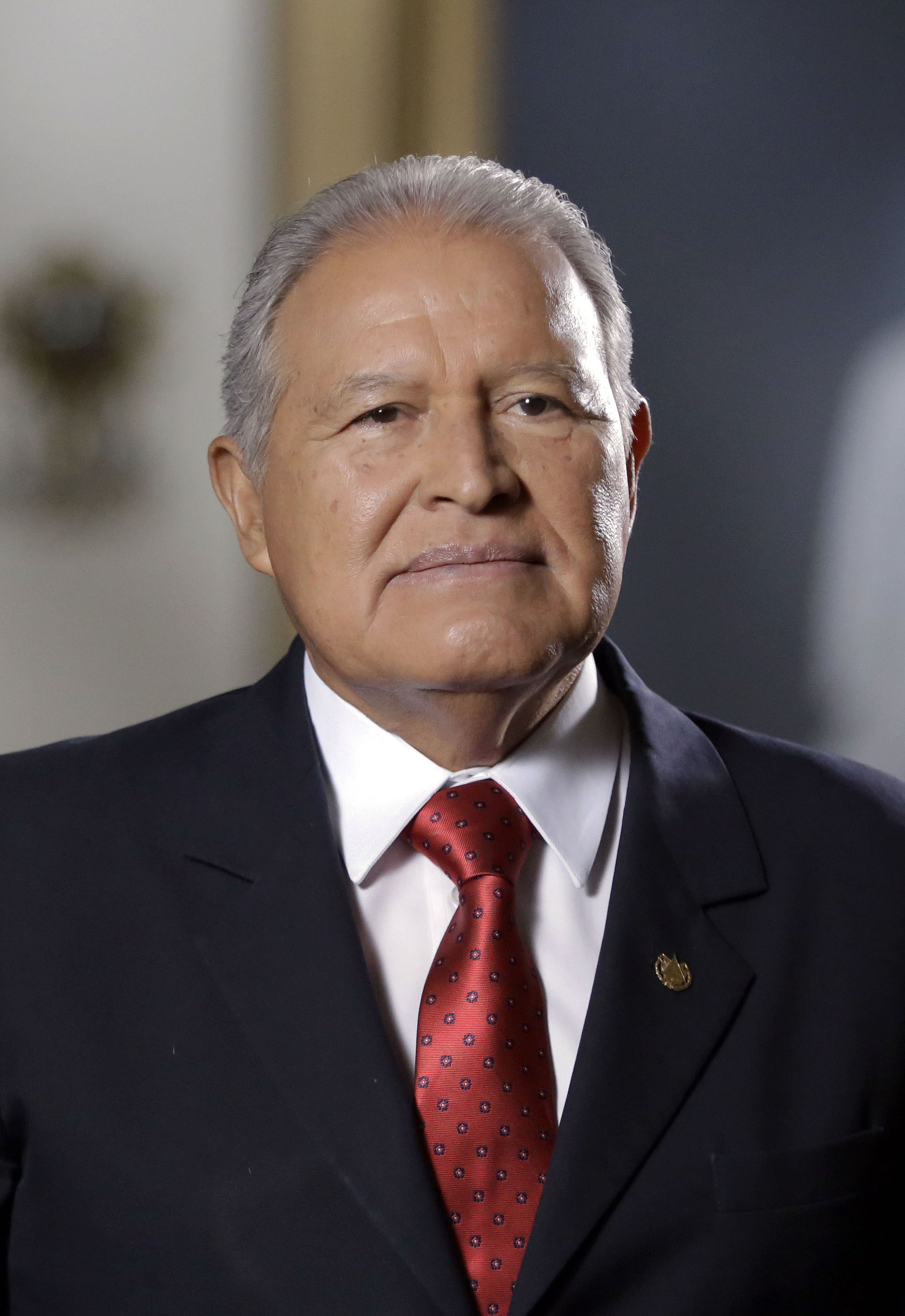 Cadena 12